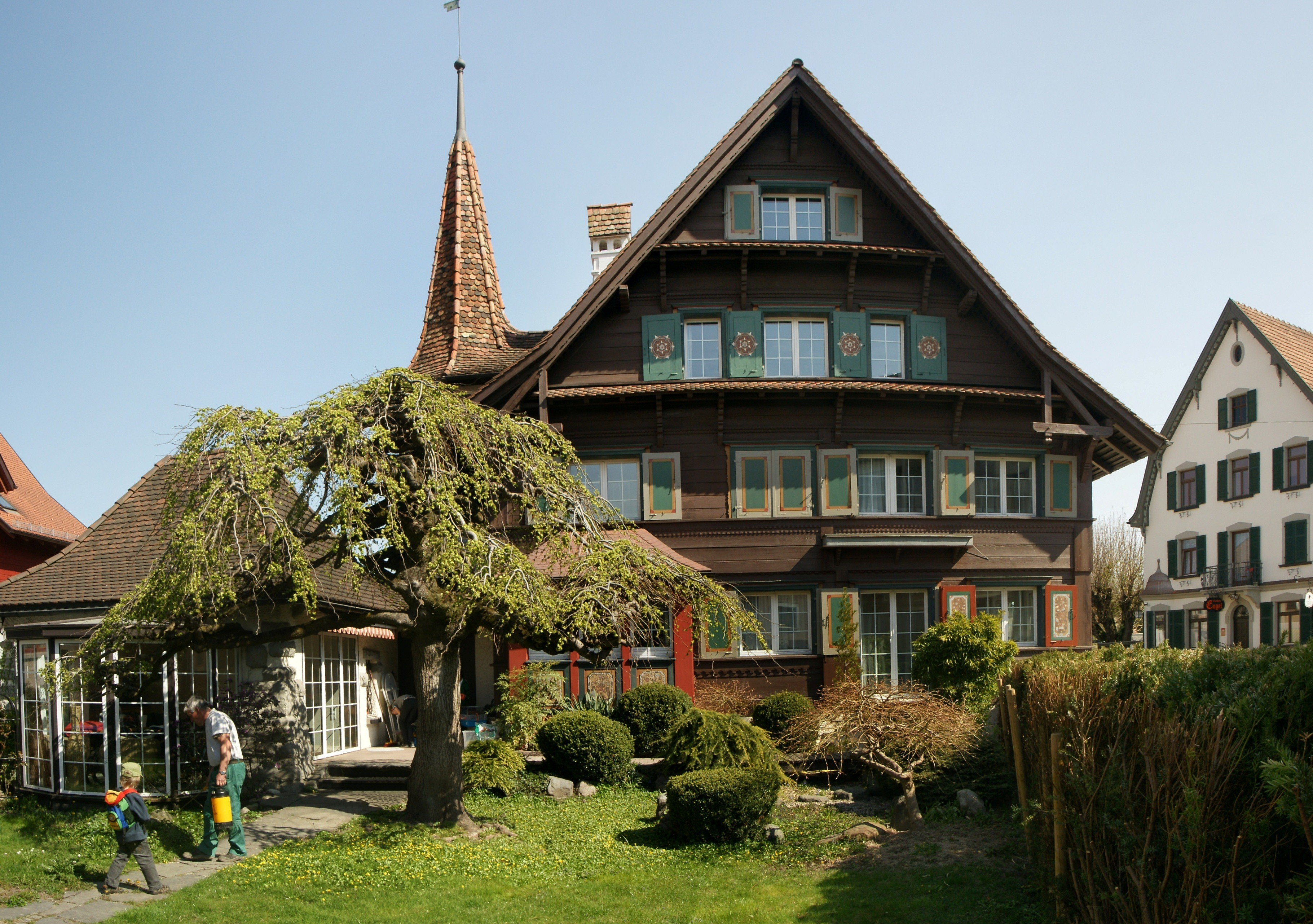 aus dem DEHIO Vorarlberg 1983: Hard, Landstraße Nr.4: Wohnhaus im Typus des Rheintalhauses, 1936 nach Plan von Johann Anton Tscharner.